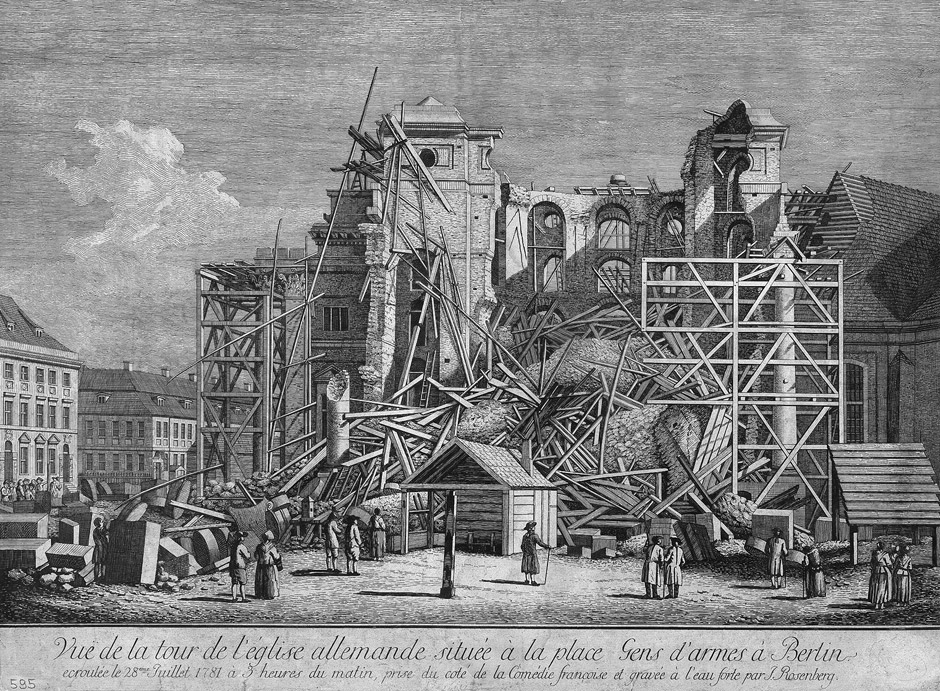 Vuë de la tour de l'église allemande située à la place Gensd'armes à Berlin ecroulée le 28eme Juillet 1781. Radierung. 45,5 x 62 cm. (Jean Rosenberg, 1781)